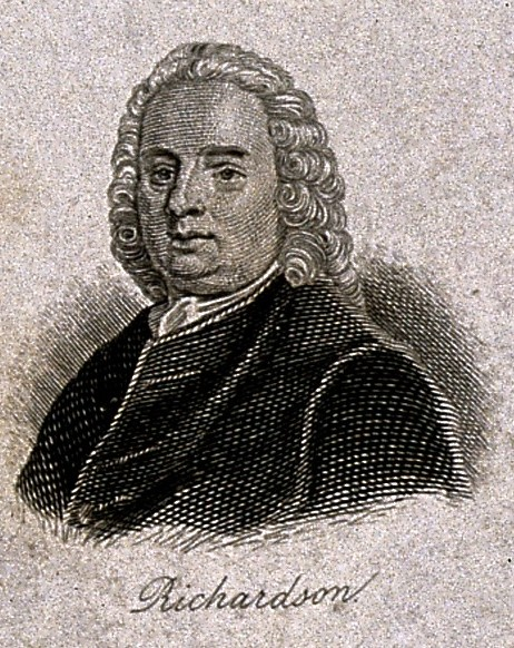 Portrait de Samuel Richardson : détail d'une gravure de John William Cook intitulée "Miscellaneous Writers" représentant une série de 20 portraits d'écrivains britanniques des XVIIe et XVIIIe siècles